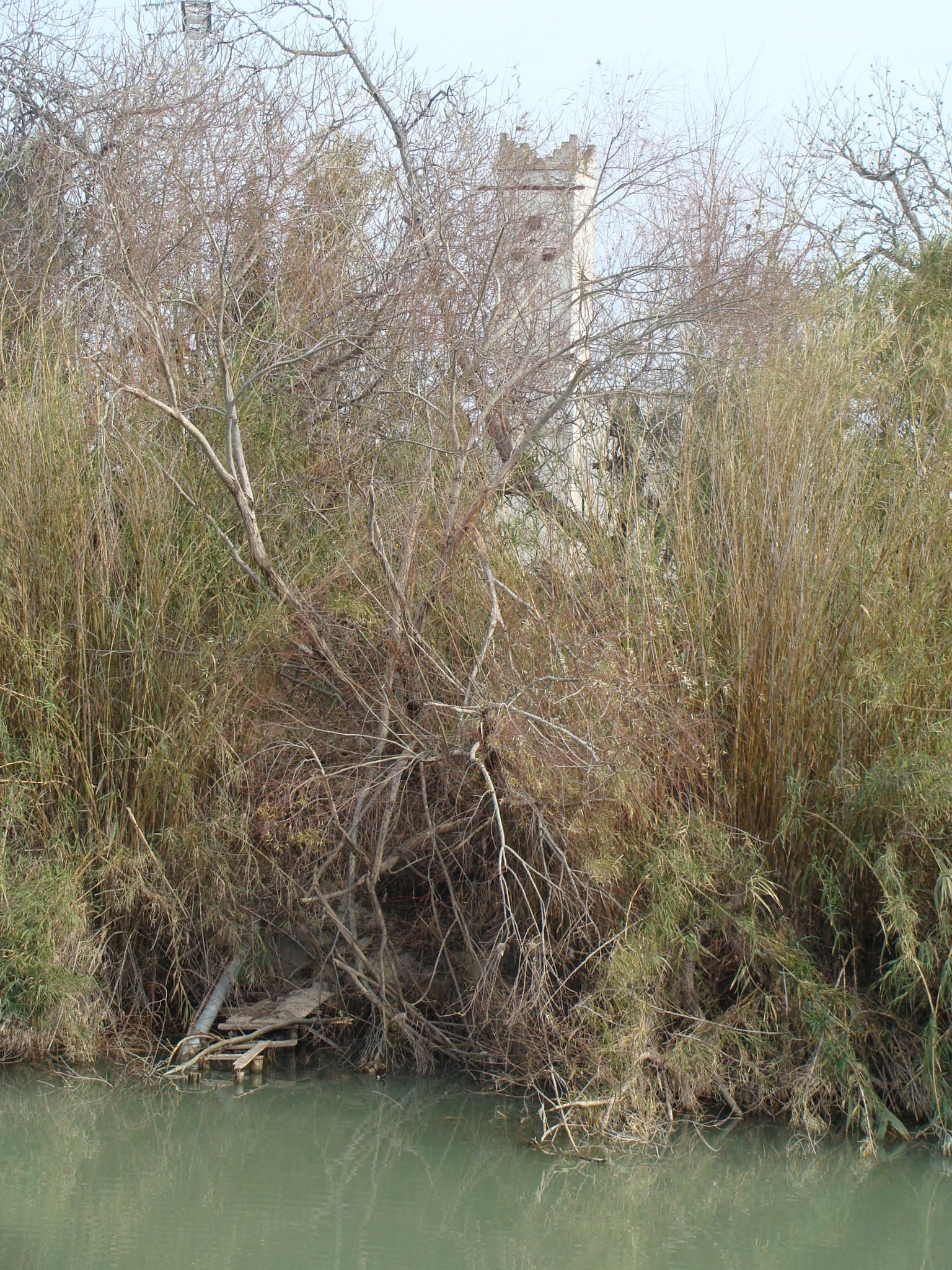 Bombeo de agua del río Júcar para la alimentación de acequias a los arrozales de Sueca. Puede verse entre la vegetación ribereña, la tubería de aducción y la torre del motor de bombeo. El lugar queda en la ribera izquierda del río muy cerca de Fortaleny.